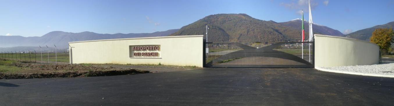 Entrata secondaria dell'Aeroporto dell'Aquila, meglio conosciuto come Aeroporto dei Parchi, sito in località Preturo